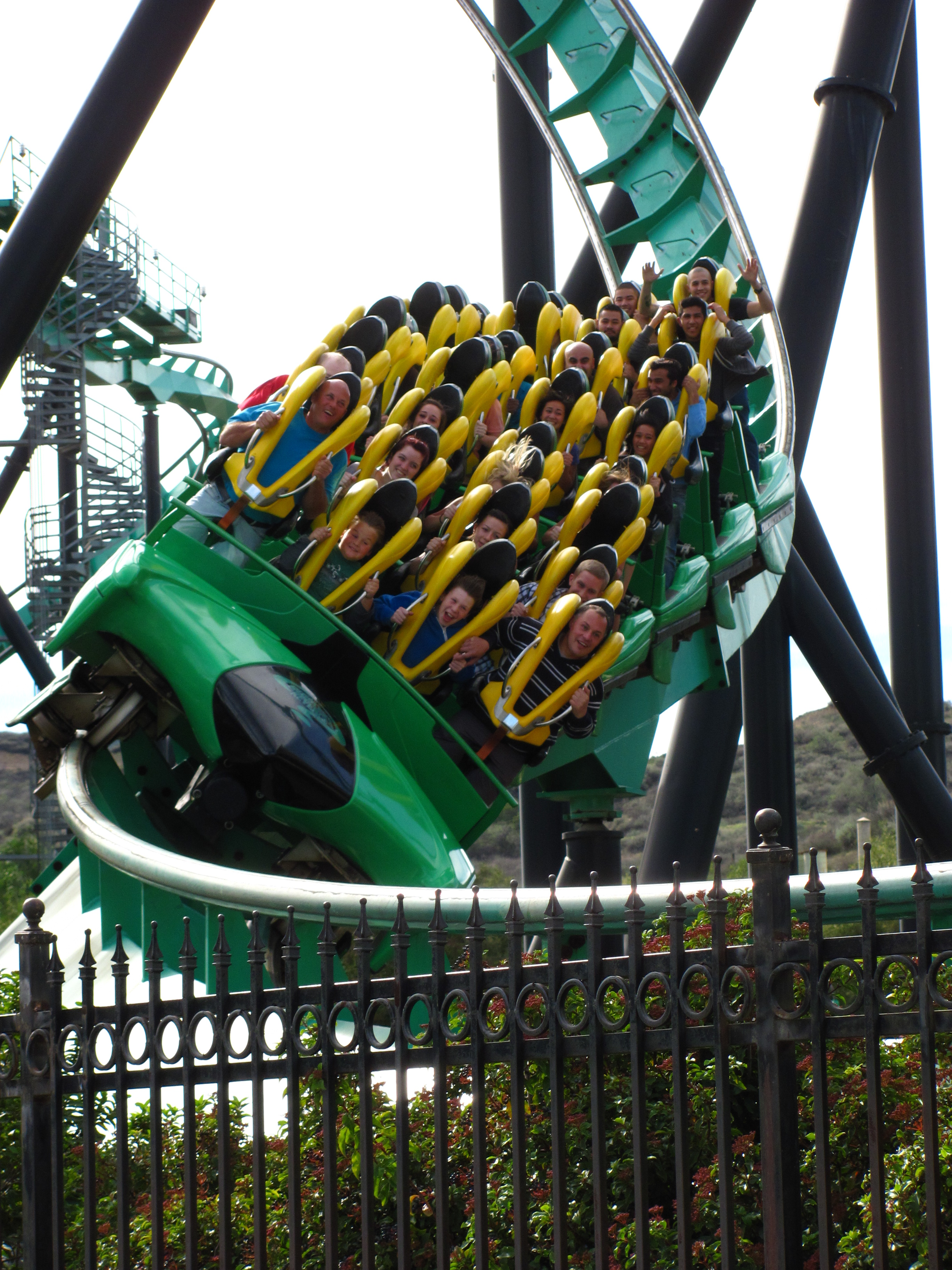 Riddler's Revenge